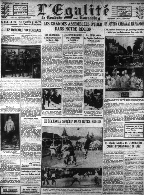 Journal L'Egalite de Roubaix Tourcoing 1933 05 01